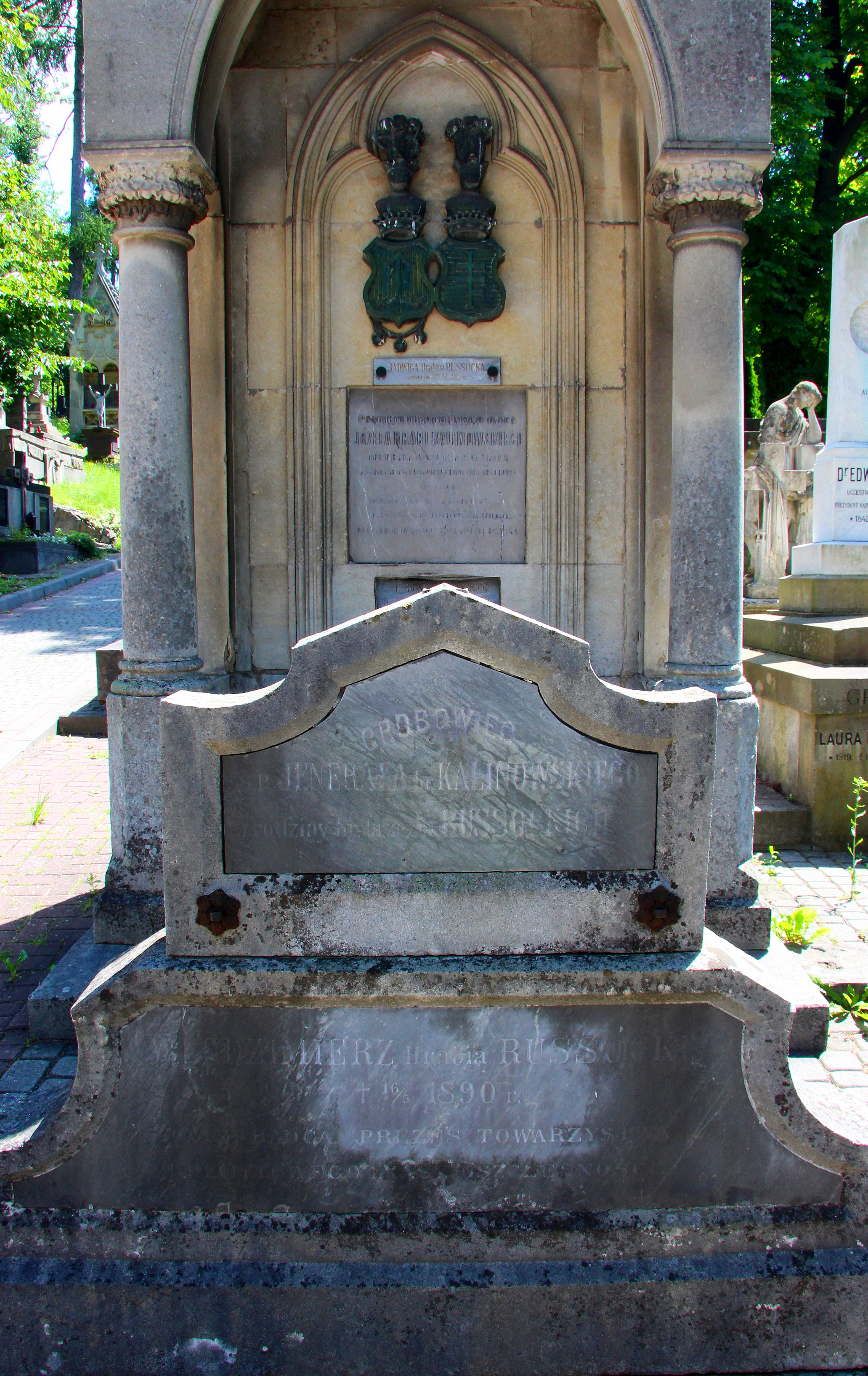 Гробниця родин Каліновських та Руссоцьких.Личаківський цвинтар , поле № 5.